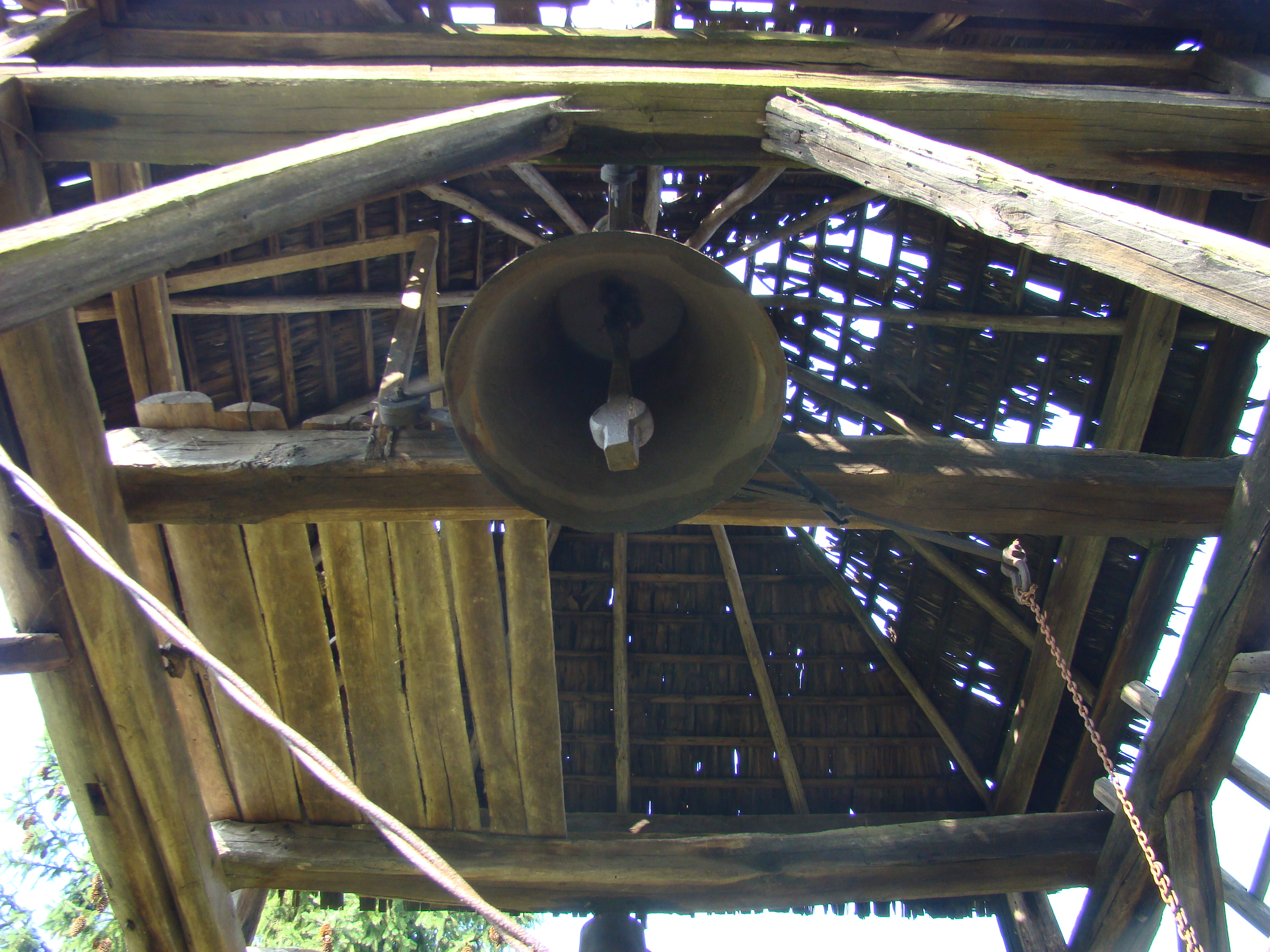 Biserica de lemn din Sălciua